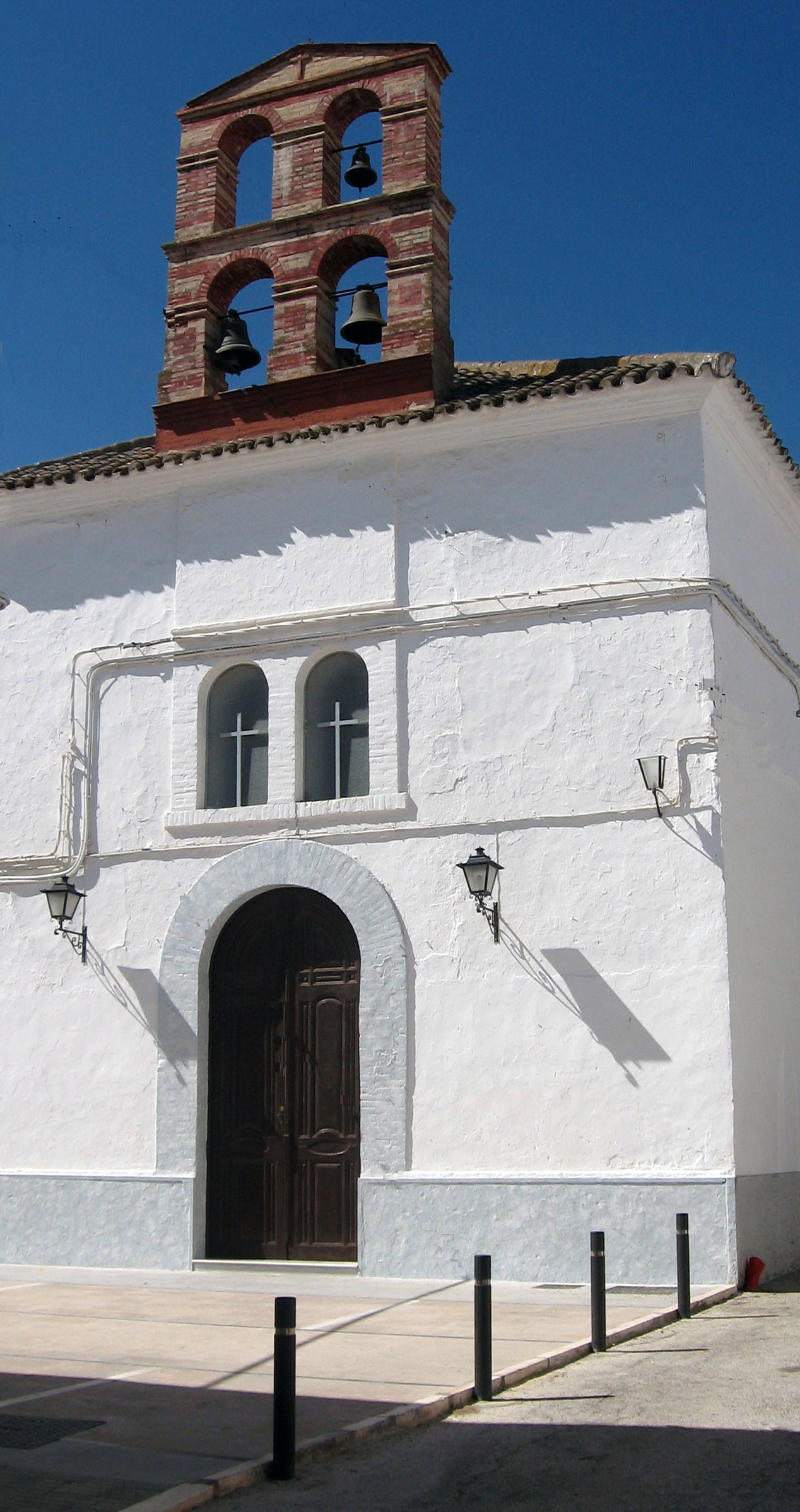 Ermita del Santo Cristo de la Vera Cruz en la población de Monturque de Córdoba Spain